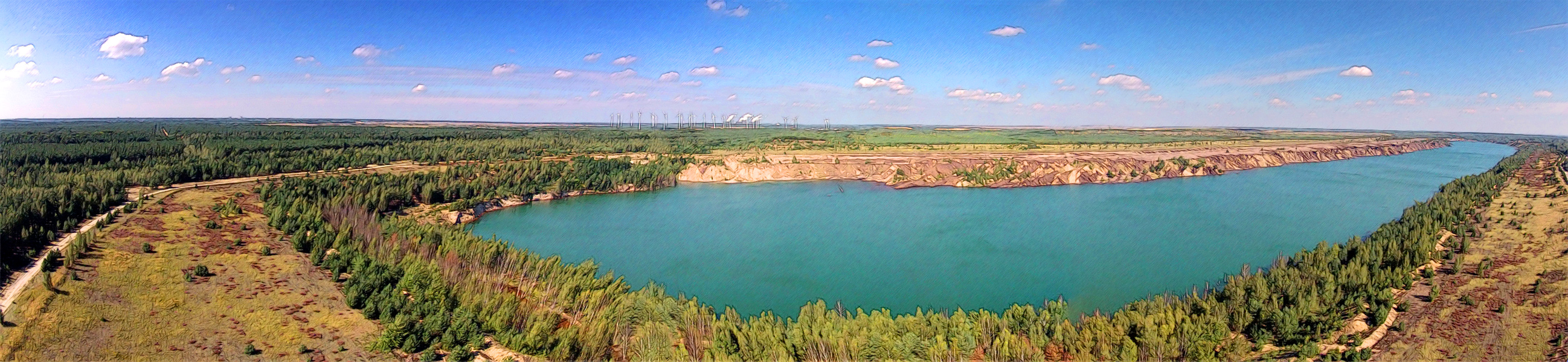 Der Klinger See, Flutungszustand September 2012 / KAP-Luftaufnahme, grafisch anonymisiert